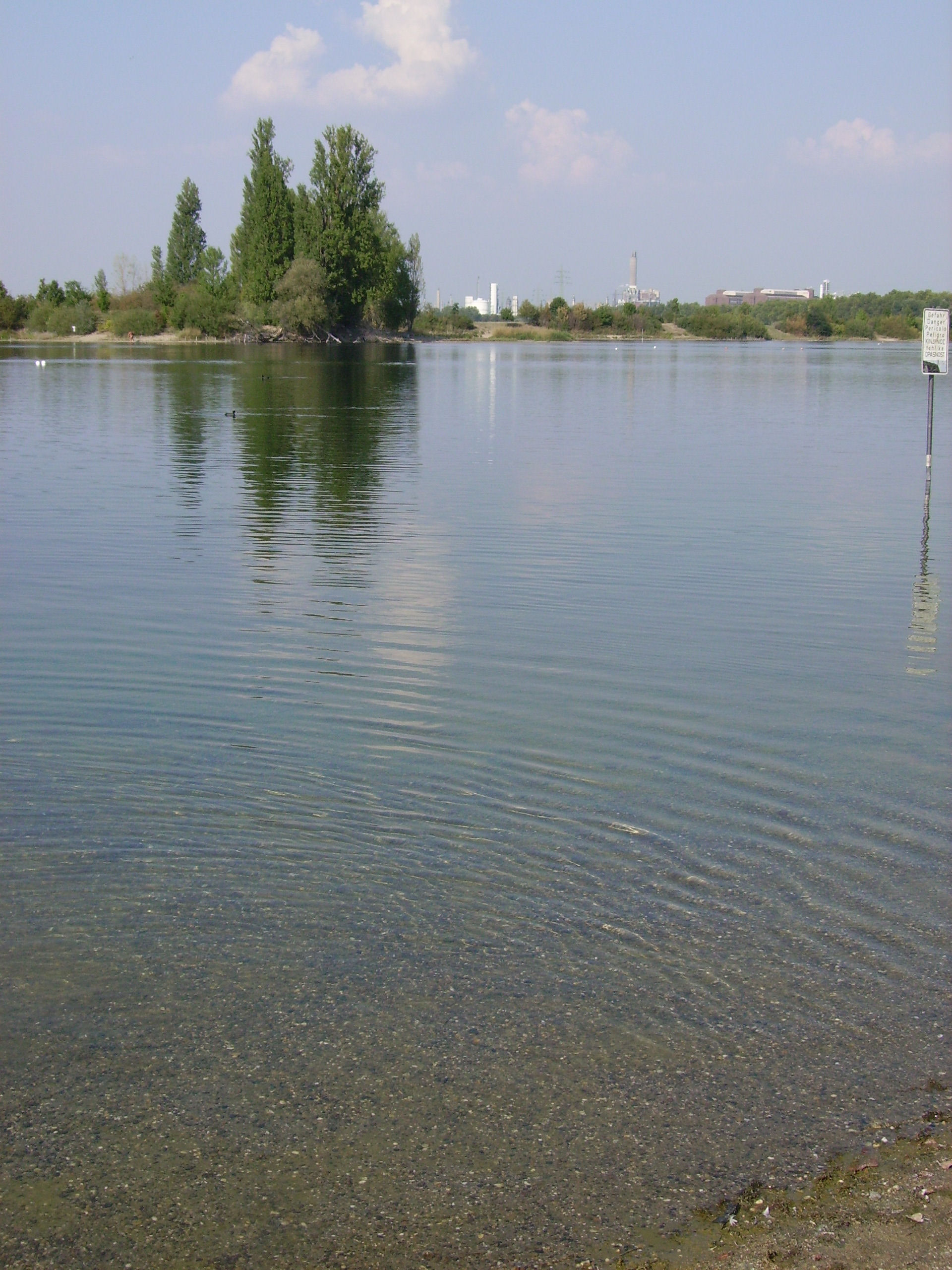 Willersinnweiher, Ludwigshafen, Rheinland-Pfalz (Germany)